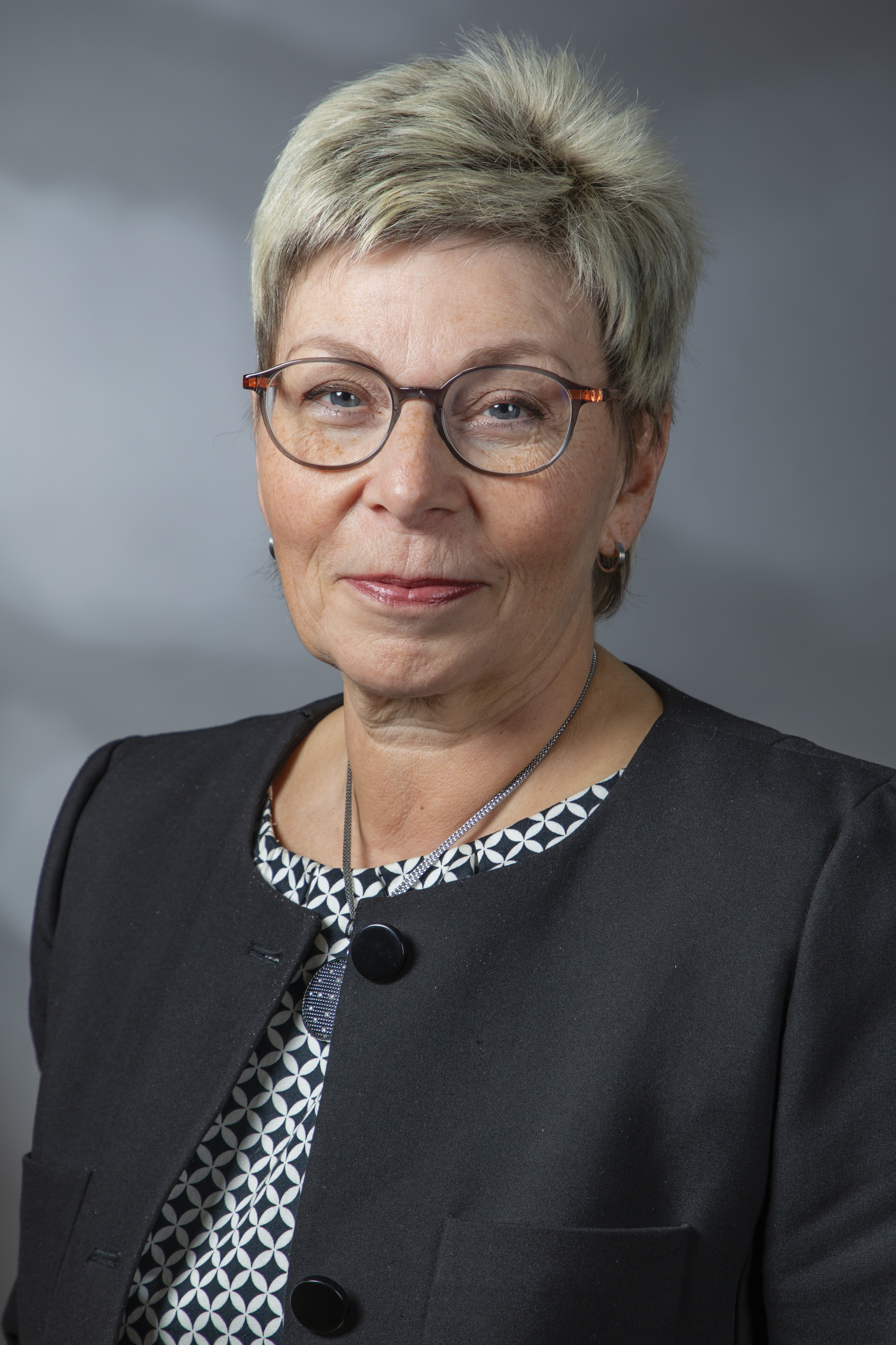 Carina Gödecke Wikipedia-Landtagsprojekt NRW 2019 22 March 2019 in DüsseldorfThis file was taken during the project “Landtag Nordrhein-Westfalen 2019” (German). Organisation: Olaf KosinskyPhotography: Foto-AG Gymnasium Melle: Karsten Mosebach, Anna Borchert, Lara Diekmann, Marieke Eckjans, Neele Grieger, Charlotte Meyran, Carolin Möller, Leoni Potts, Alicia Wulbusch Usage information If you need more information how to use this file, please send an email to . The making of this document was supported by Skillshare. Personality rights warningAlthough this work is freely licensed or in the public domain, the person(s) shown may have rights that legally restrict certain re-uses unless those depicted consent to such uses. In these cases, a model release or other evidence of consent could protect you from infringement claims.